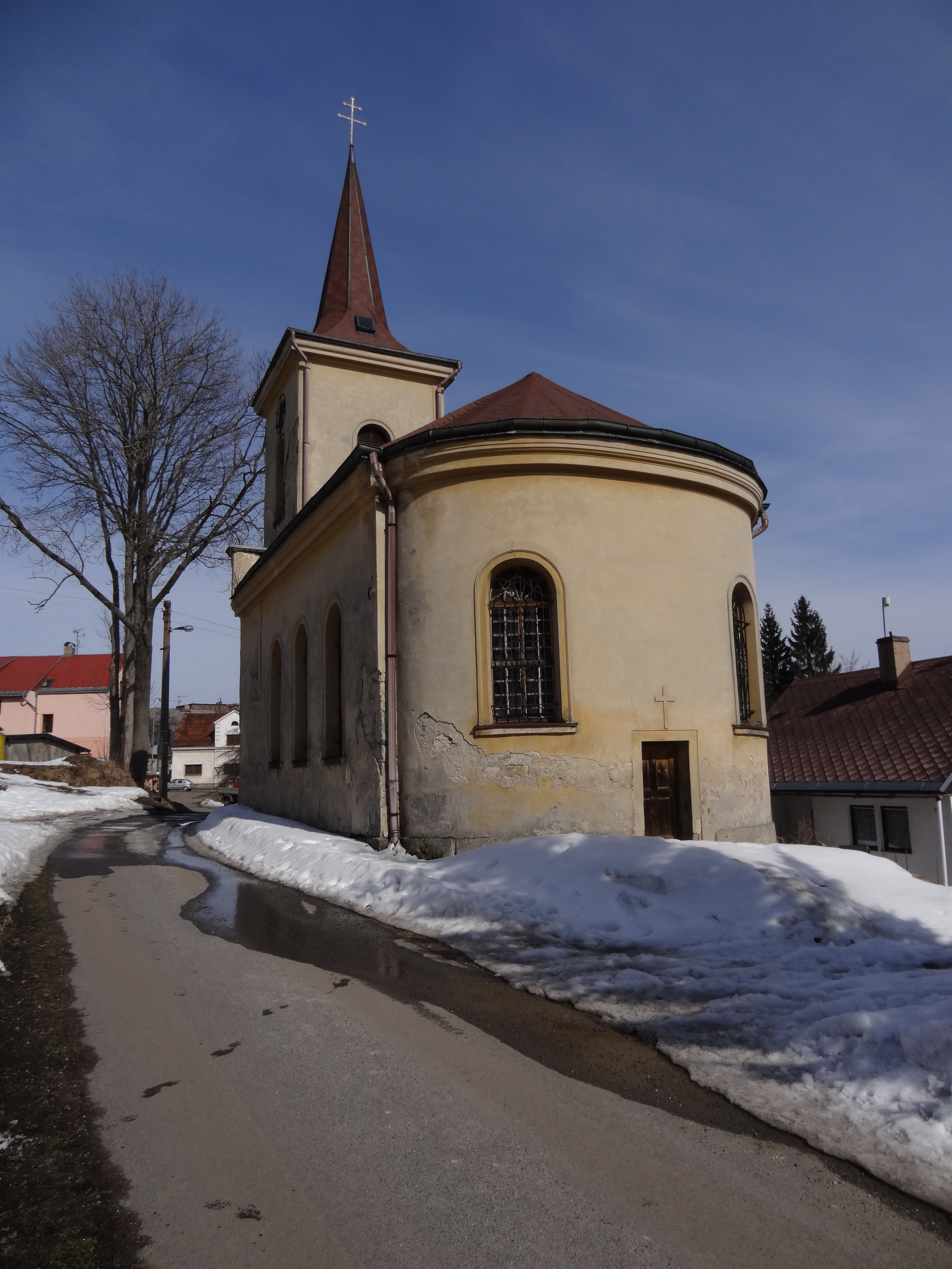 Vrkoslavice - kostelík sv. Jana Nepomuckého